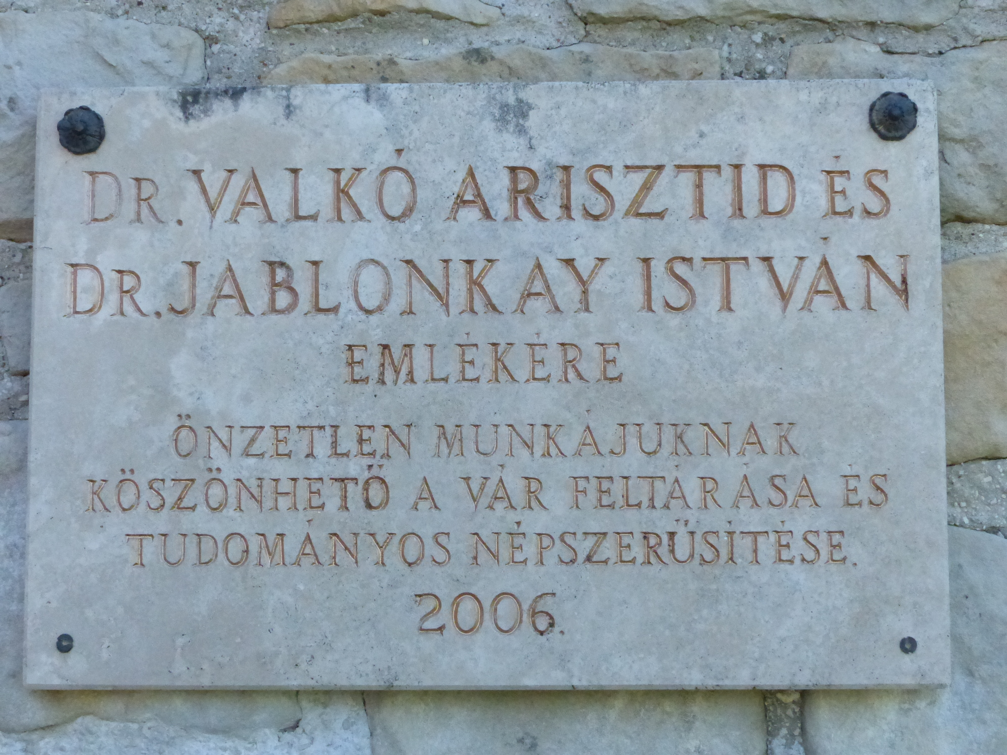 Valkó Arisztid és Jablonkay István emléktáblája. A felvétel szombaton, 2017. május 20-án készült Sólyomváron (Solymár). Valkó Arisztid és Jablonkay István a Sólyomvár feltárói. J. V. Haefler véleménye szerint Solymár község neve a Sólyomvár összeolvadásál eredt. A Schlossberg: magyar megfelelője: "Várhegy". Az 1700-as évek elején beérkező sváb telepesek e területről hordták el a középkori vár romjait, melyből felépítették az akkori község első telepesházait. A dombtető - legelő sváb elnevezése (Schlossberg) minden bizonnyal a korábbi hagyomány német folytatása. A dűlőt sokáig legelőként használták, de a nevének köszönhetően megmaradt az egykori vár emléke a köztudatban is. A Sólyomvár feltárói a hagyományos elnevezés alapján kutattak ezen a területen a vár után. Forrás